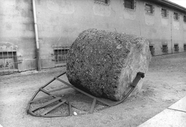 Mahn- und Gedenkstätte Ravensbrück, Walze ADN-ZB Bartocha 5.11.85 Bez. Neubrandenburg: Nationale Mahn- und Gedenkstätte Ravensbrück. Diese schwere Walze mußten Frauen beim Straßenbau ziehen. [Mahn- und Gedenkstätte für das Konzentrationslager Ravensbrück, Straßenbau-Walz] Information added by Wikimedia users.